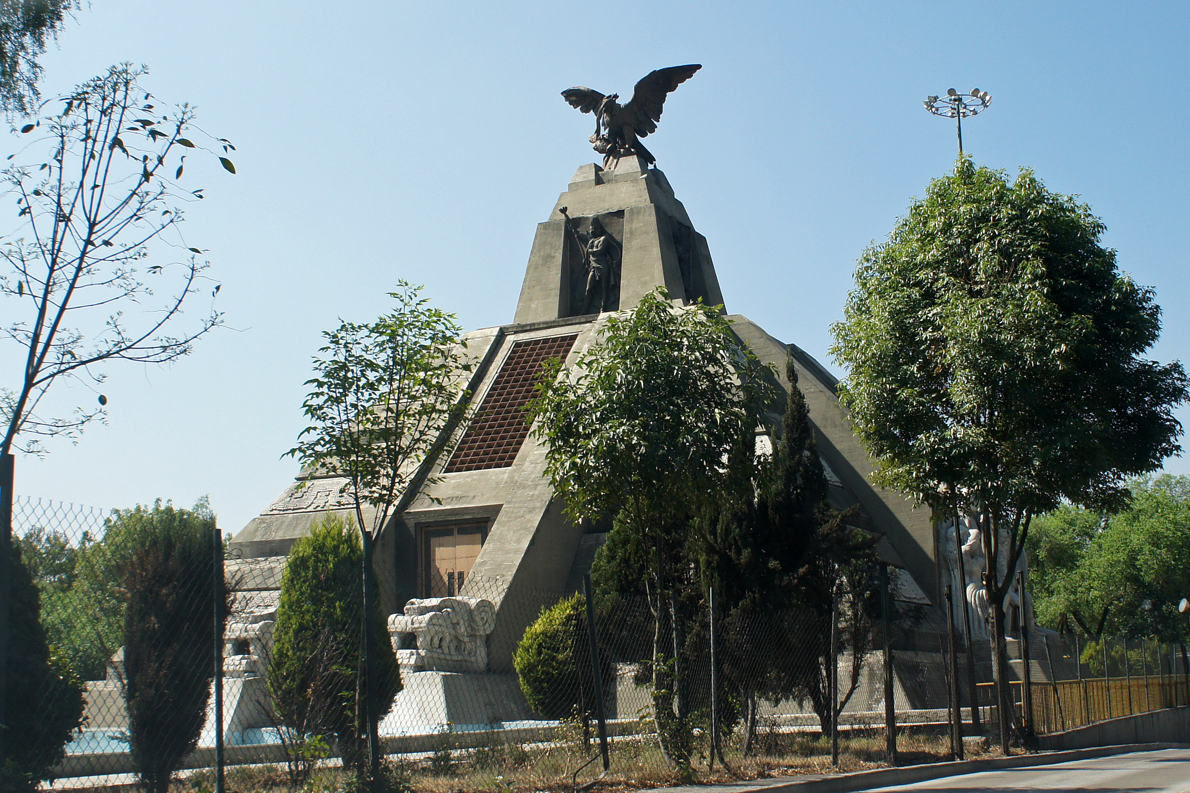 Monumento a La Raza, México DF